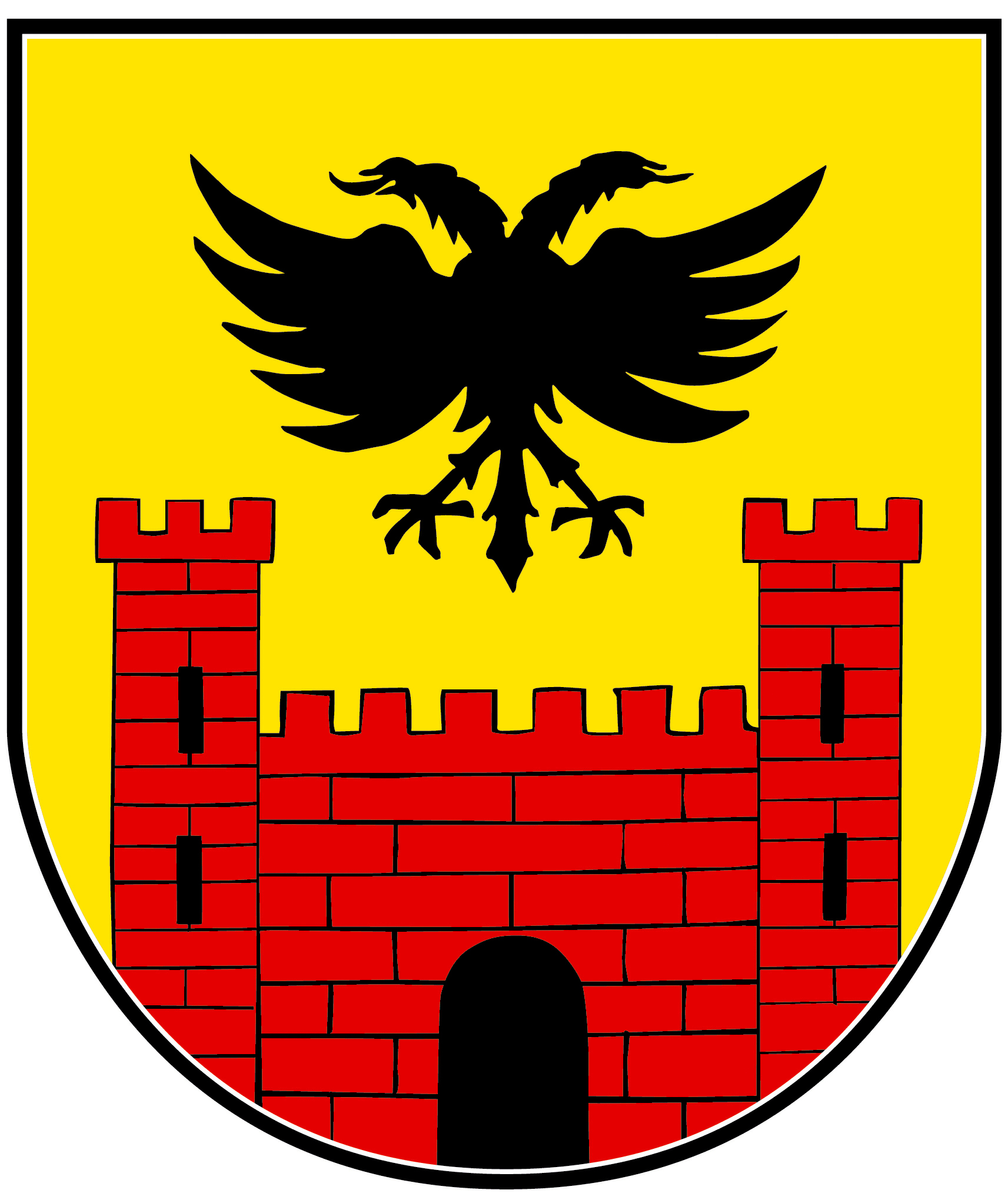 Wappen der Ortsgemeinde Freudenburg